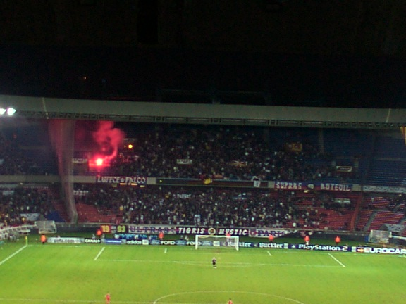 Le Virage Auteuil pendant les incidents PSG 2-0 Galatasaray, Parc des Princes, 13 Mar 2001, Paris.